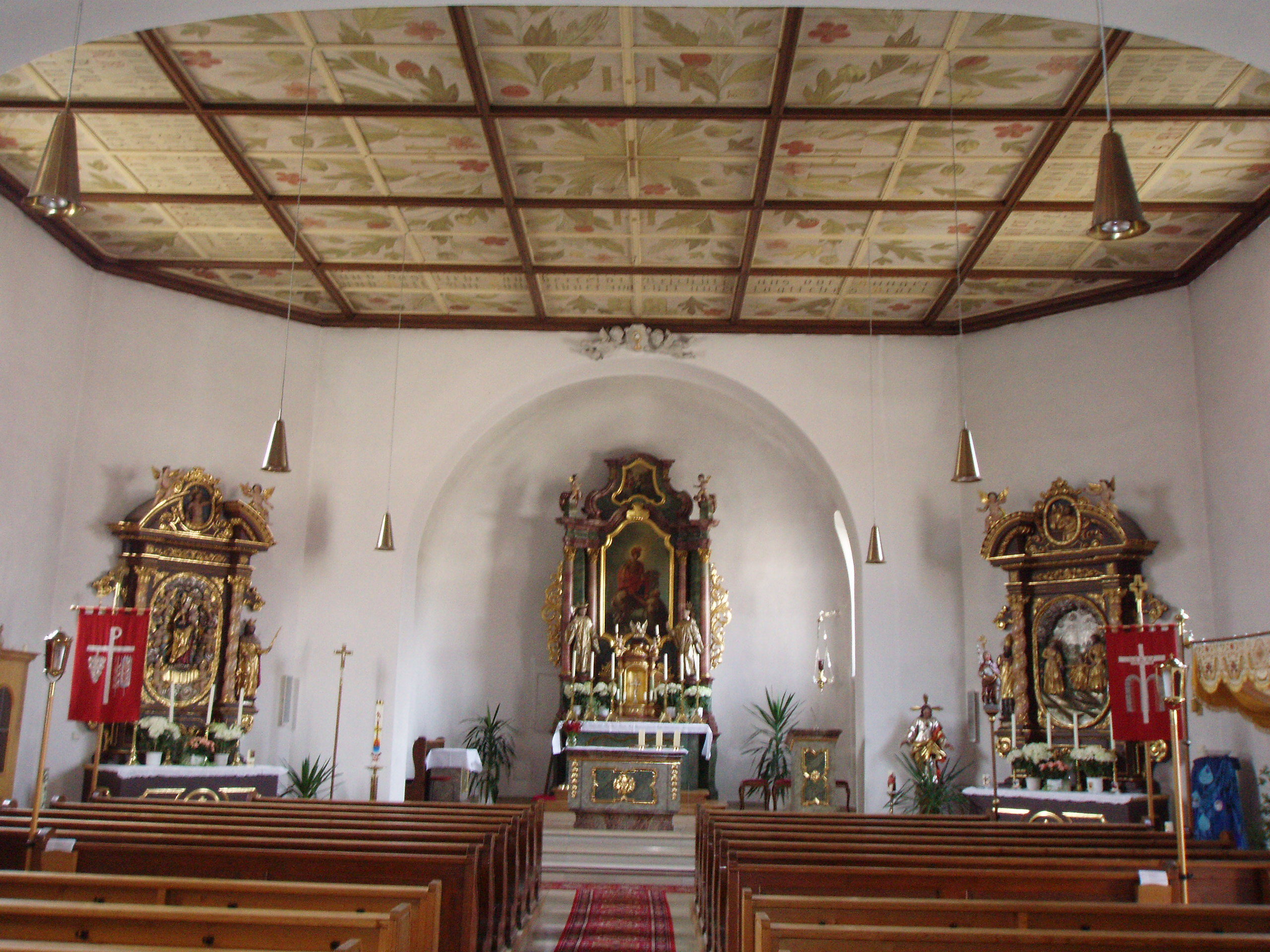 Inneres der Kirche von Tauberfeld, Gemeinde Buxheim, Landkreis Eichstätt